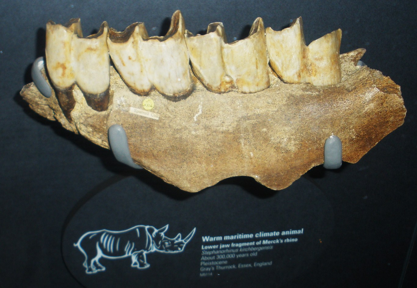 Fossil of Stephanorhinus, an extinct mammal-- Took the photo at Natural History Museum, London